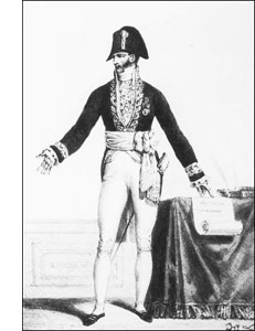 Gravure représentant un préfet du Premier Empire (1810)